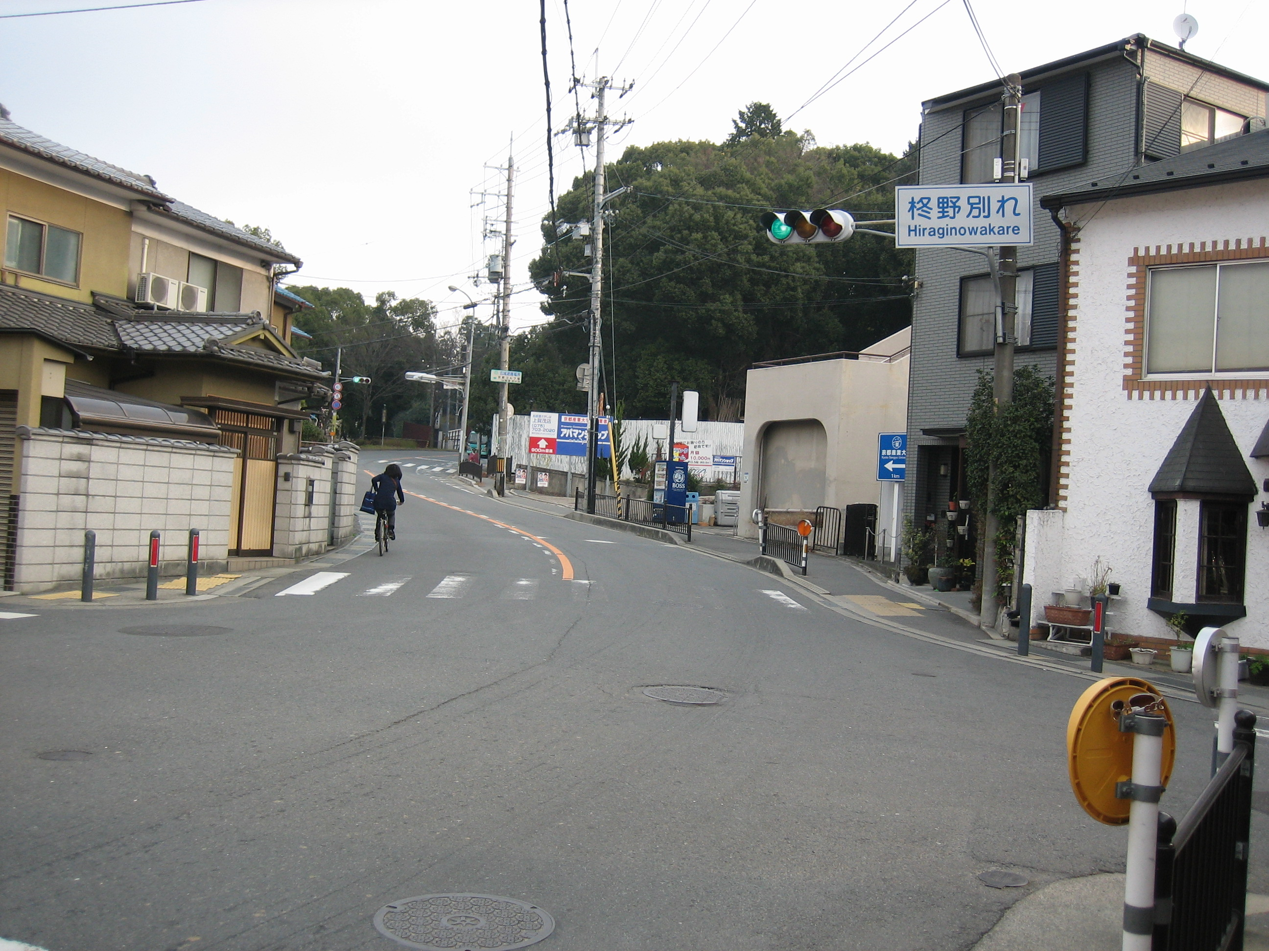 柊野別れ交差点を南西角から撮影